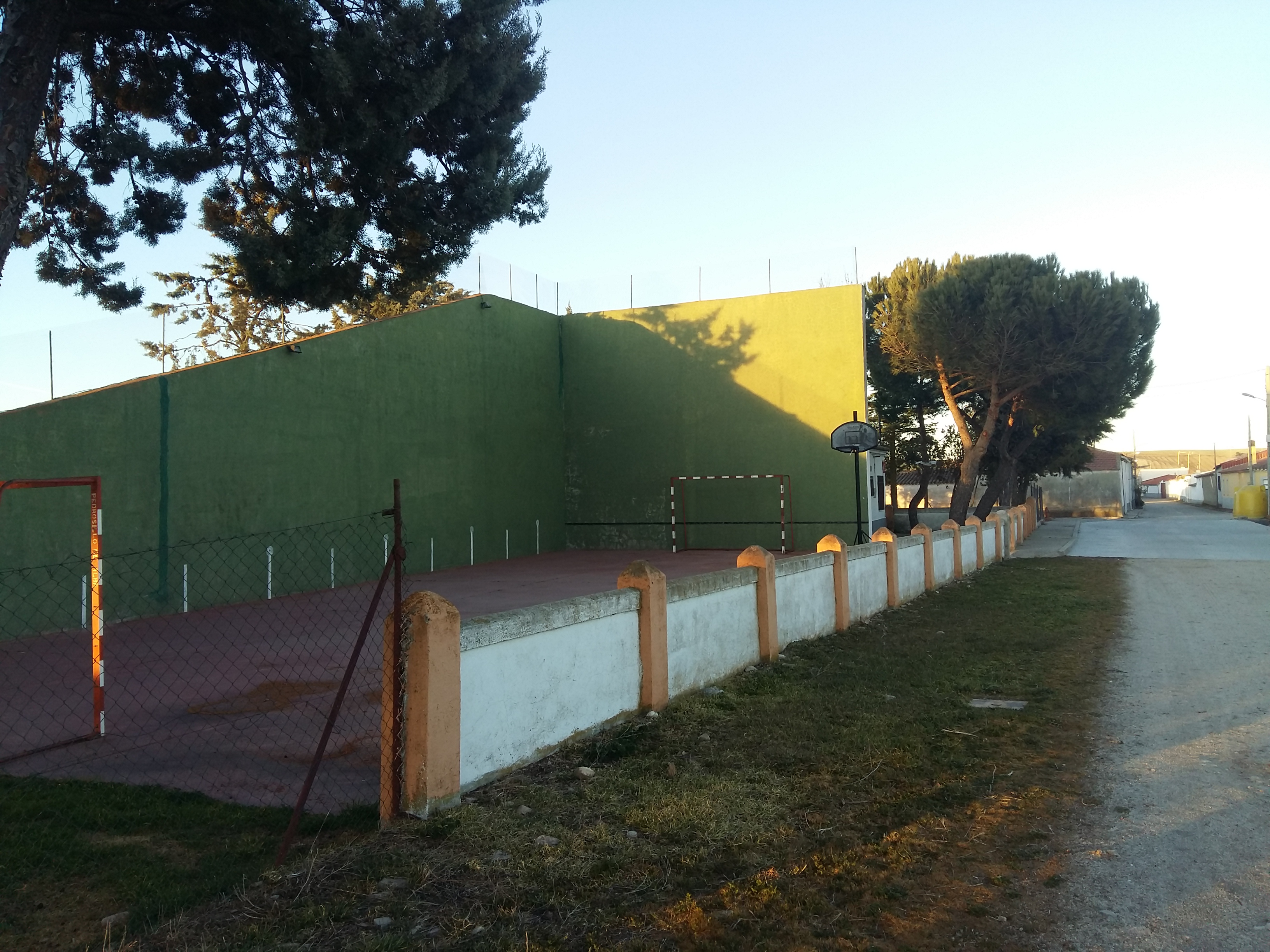 Frontón donde practicar deporte